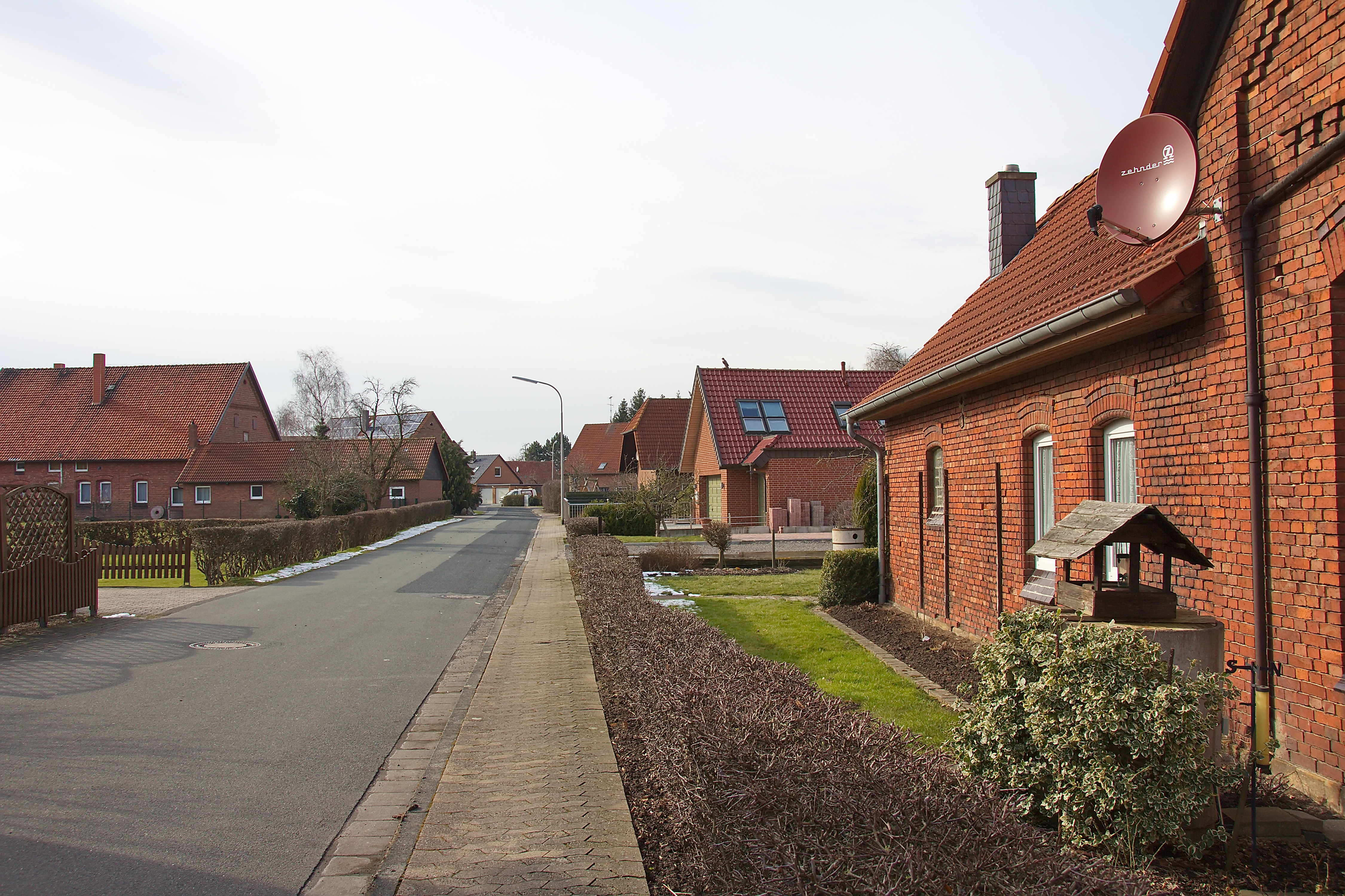 Ortsblick in Auhagen, Niedersachsen, Deutschland